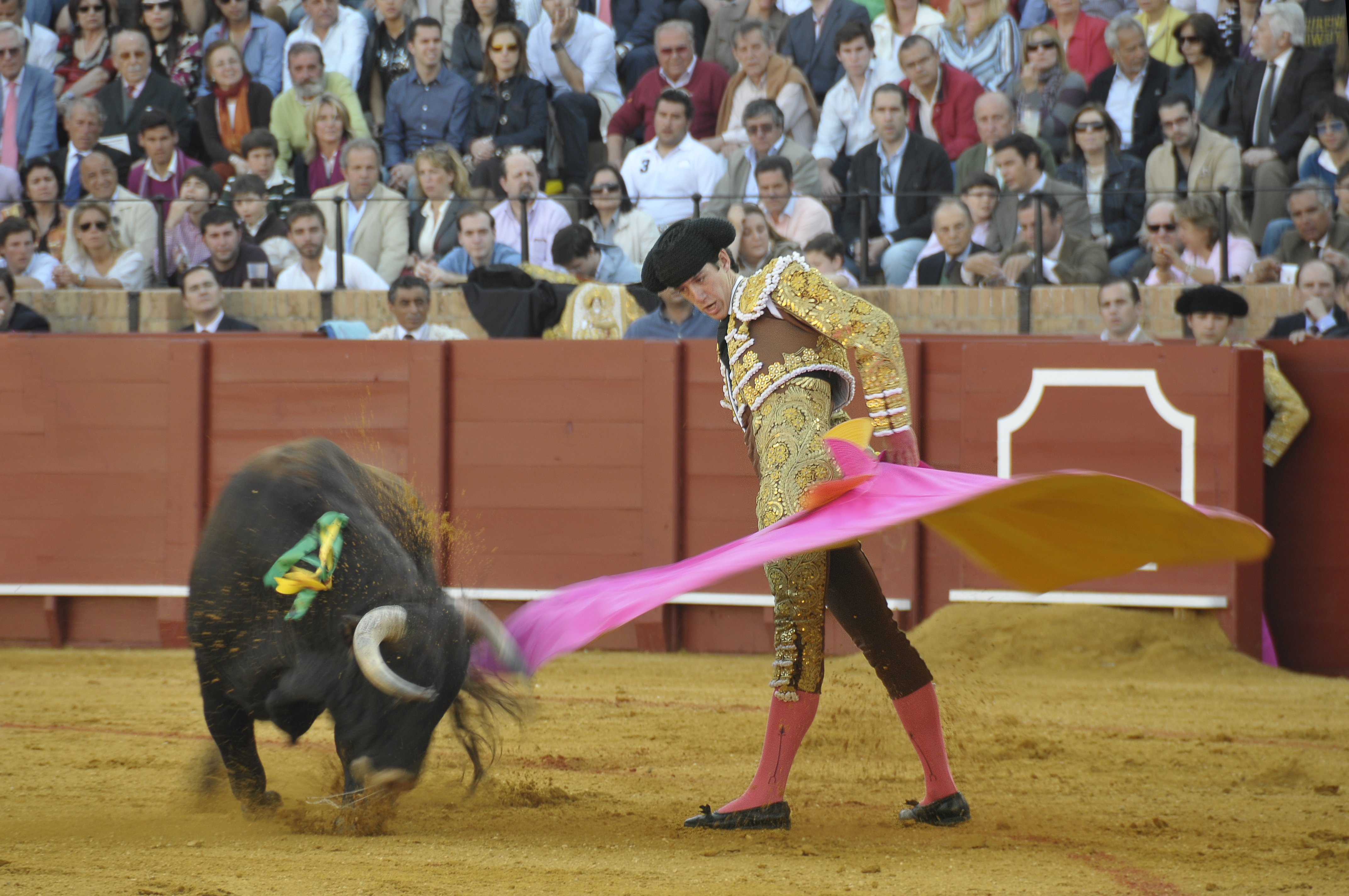 Revolera en la plaza de toros de la Maestranza de Sevilla